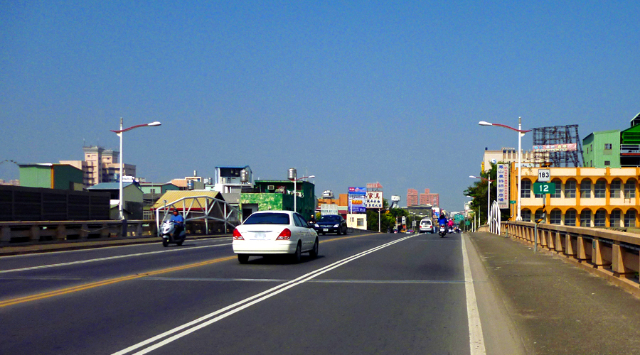 位於鳳山區的維新陸橋（2012年2月10日往鳳仁路方向拍攝）